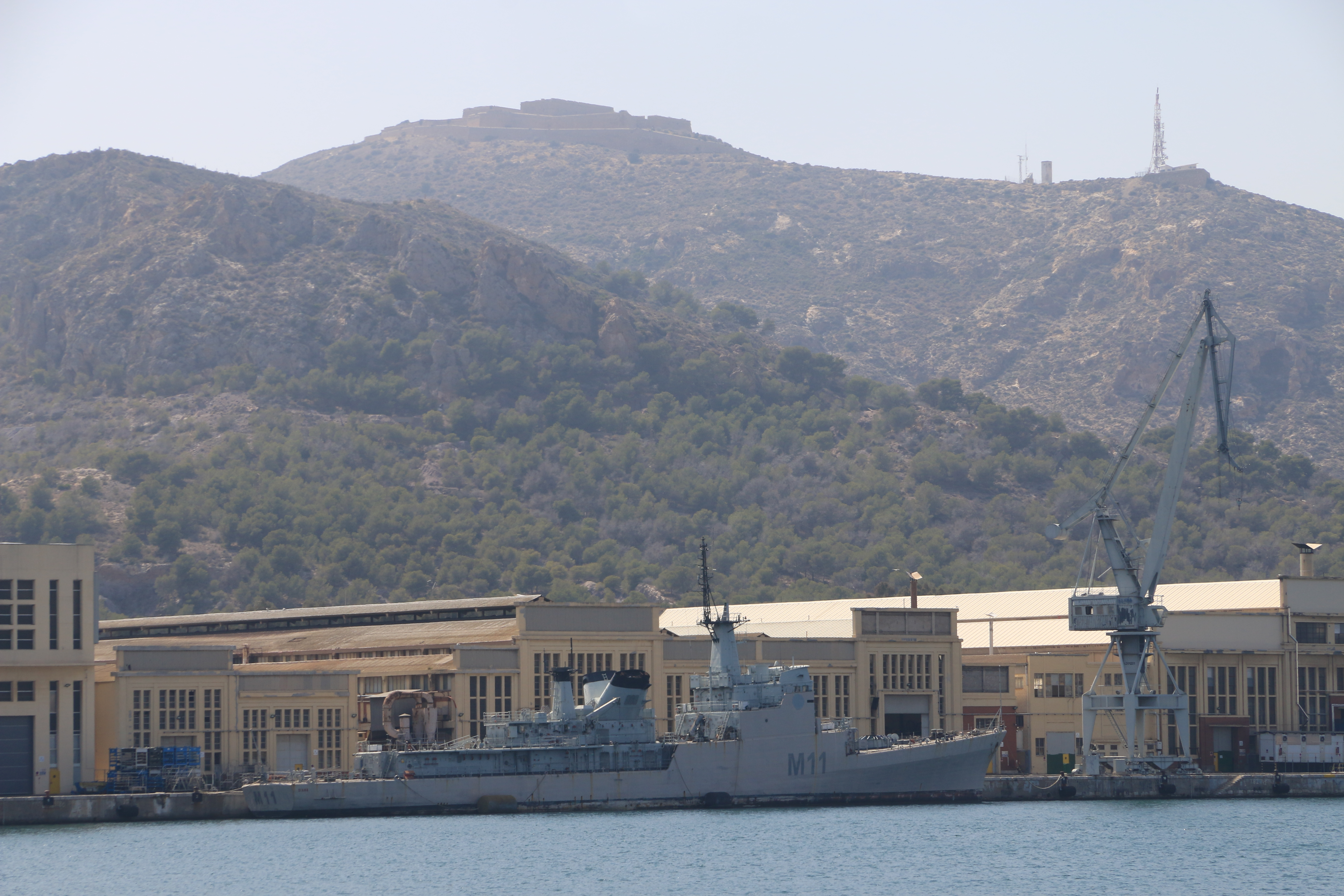 Diana F-32 (previously M-11) in the Naval Base of Cartagena in Spain 2016.